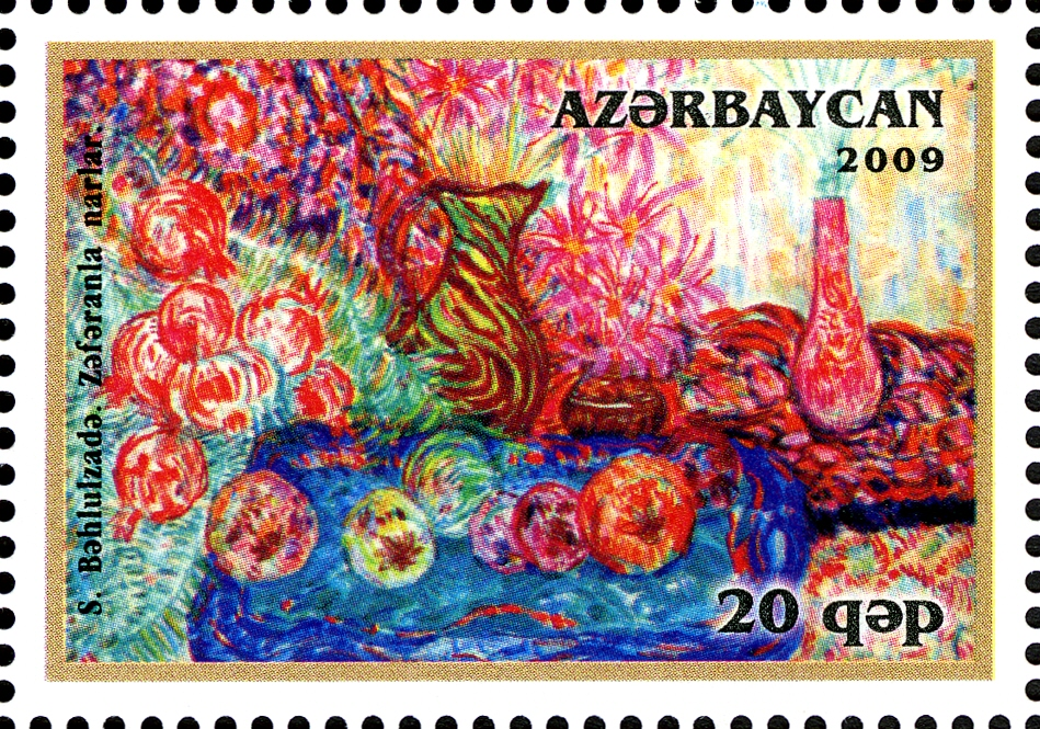 Azerbaijan Art School - Sattar Bakhlulzadeh - Saffrjn with Pomegranate